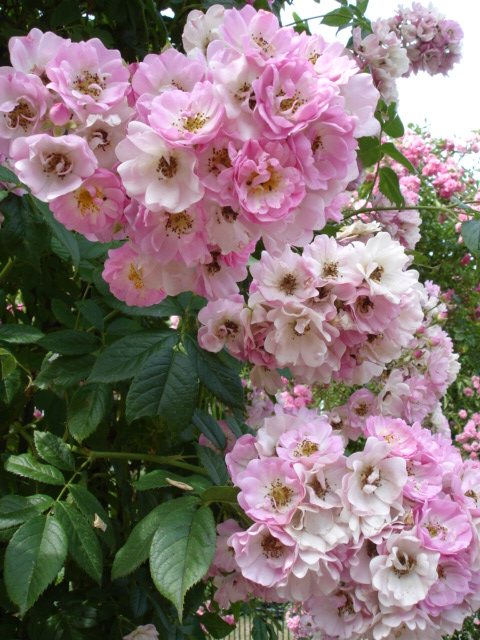 Rosa 'Blush Rambler' (Hybrid Multiflora)